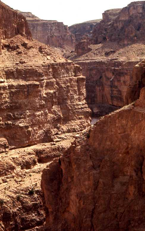 Paysage des Aurès, Algérie.